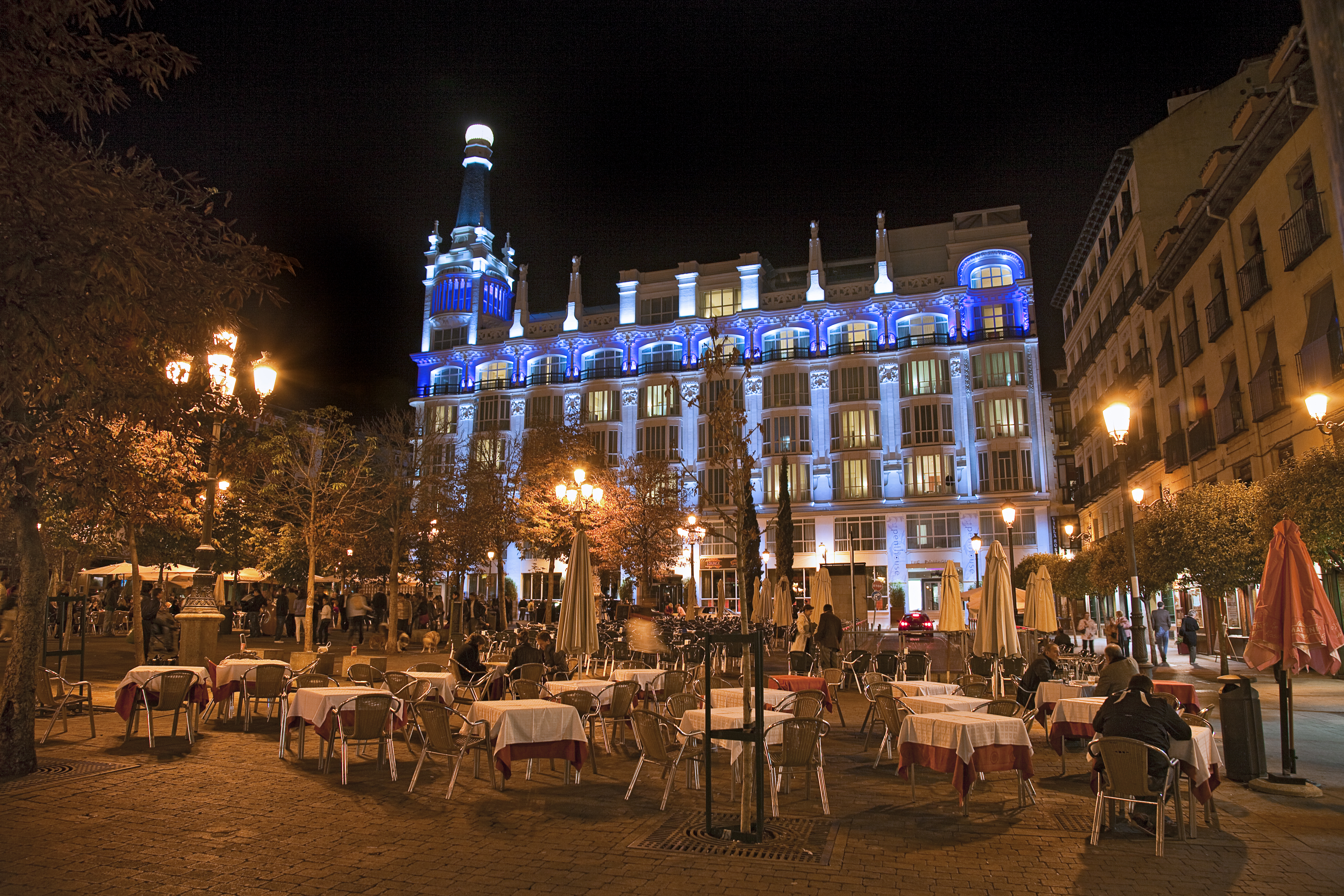 Madrid. Santa Ana Square. Spain